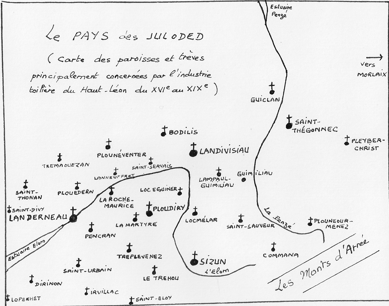 Carte du pays des juloded" (ou carte des paroisses et trèves concernées par l'industrie toilière du Haut-Léon) du XVIe au XIXe siècle